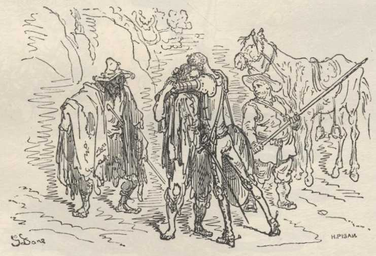 Dom Quixote abraça o Roto da Má Figura, ilustração de Gustave Doré para "Dom Quixote" de Miguel de Cervantes